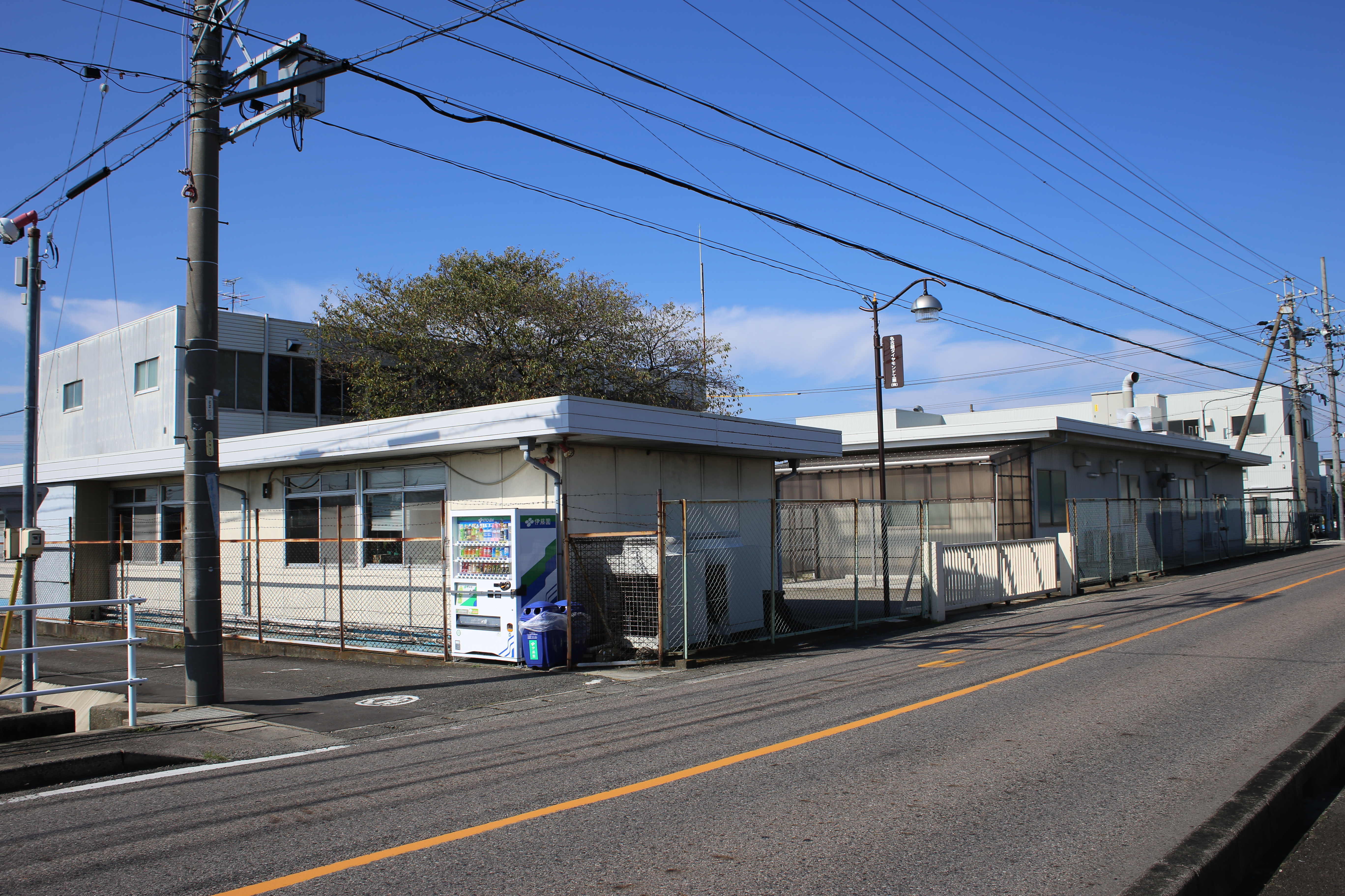 愛知県小牧市の名古屋ダイヤモンド工業本社